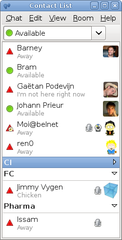 Captura de pantalla de Empathy